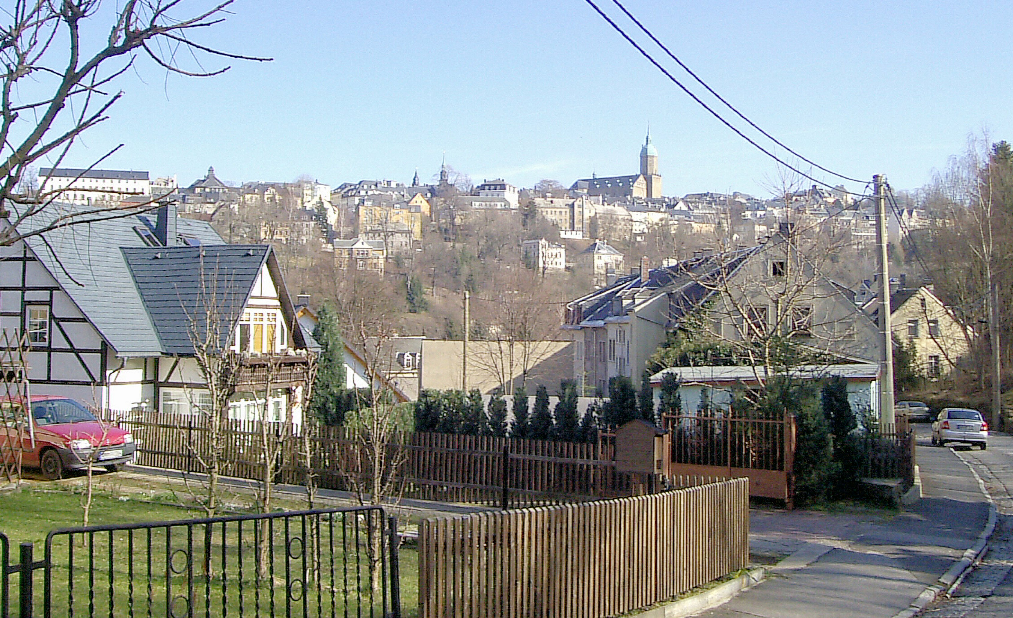 Frohnau - Blick zur St. Annen-Kirche in Annaberg-Buchholz